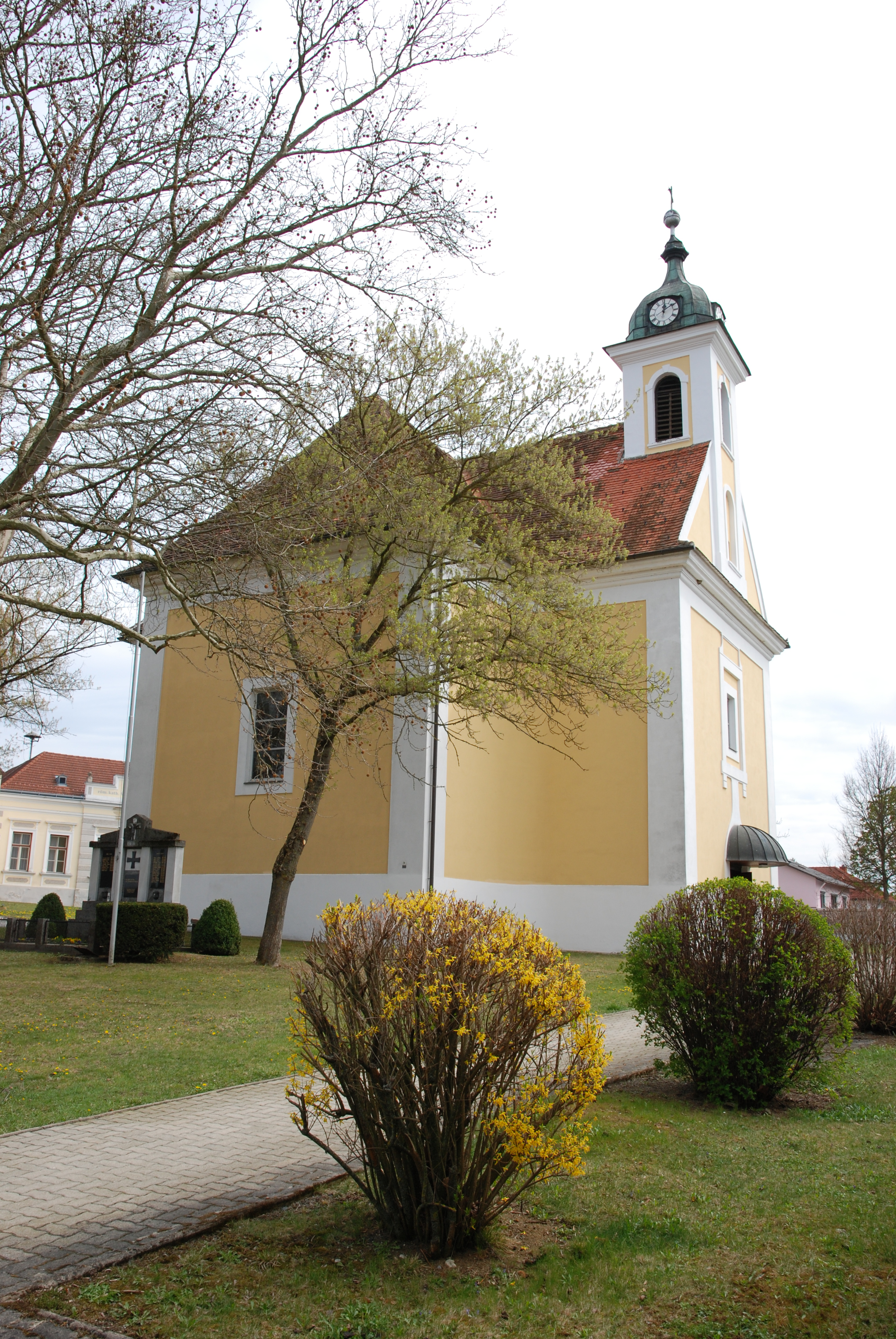 Kirche Sankt Martin in der Wart